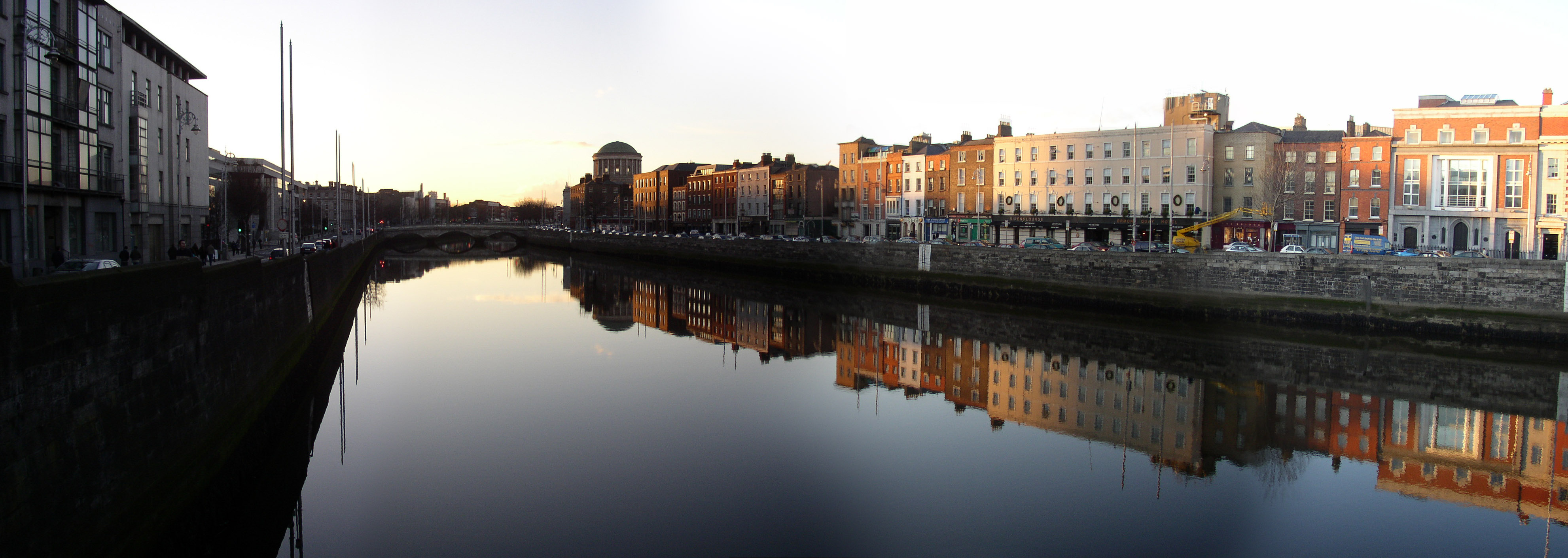 Dublin riverside